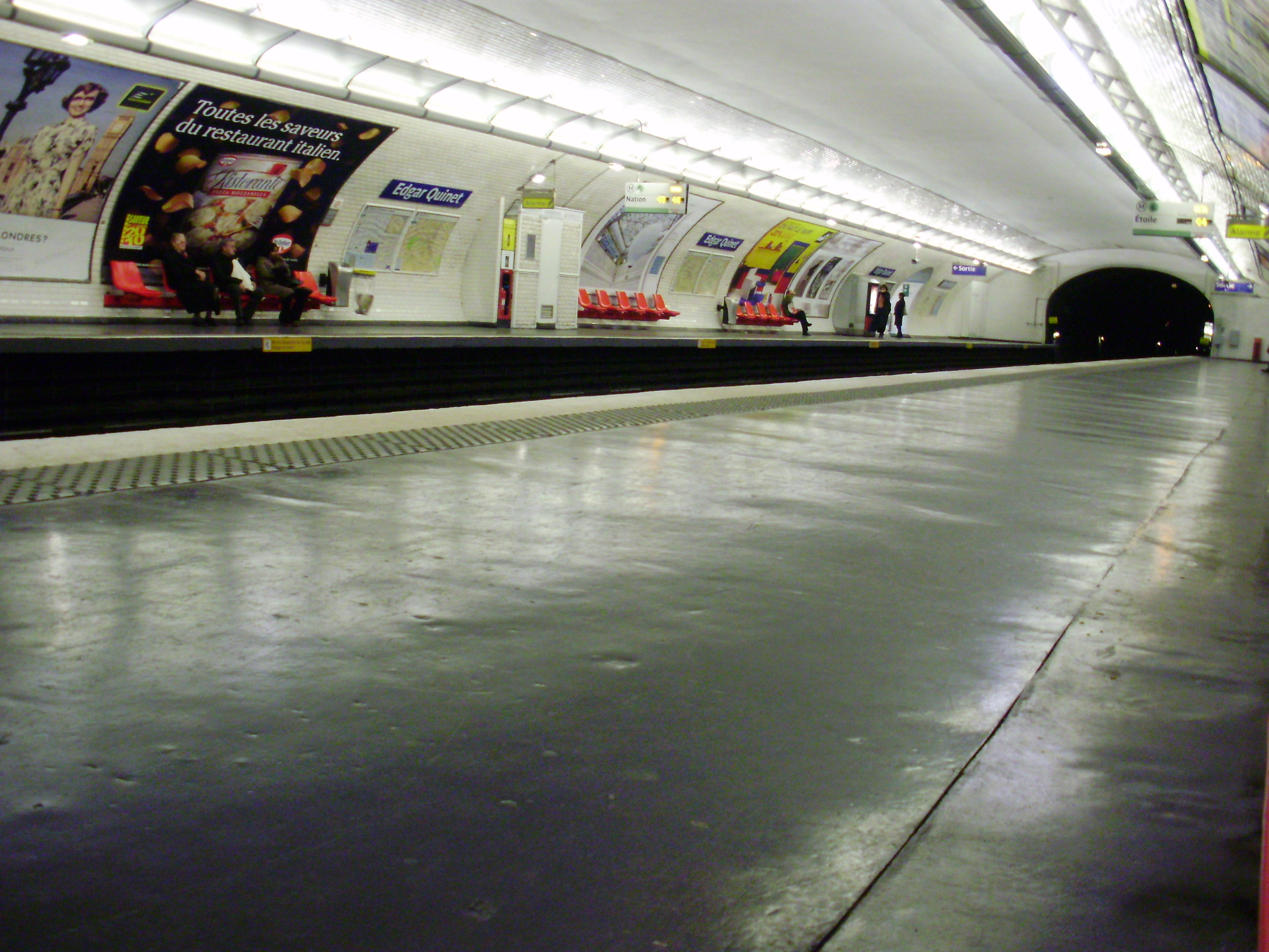 Quais de la station Edgar Quinet du métro de Paris